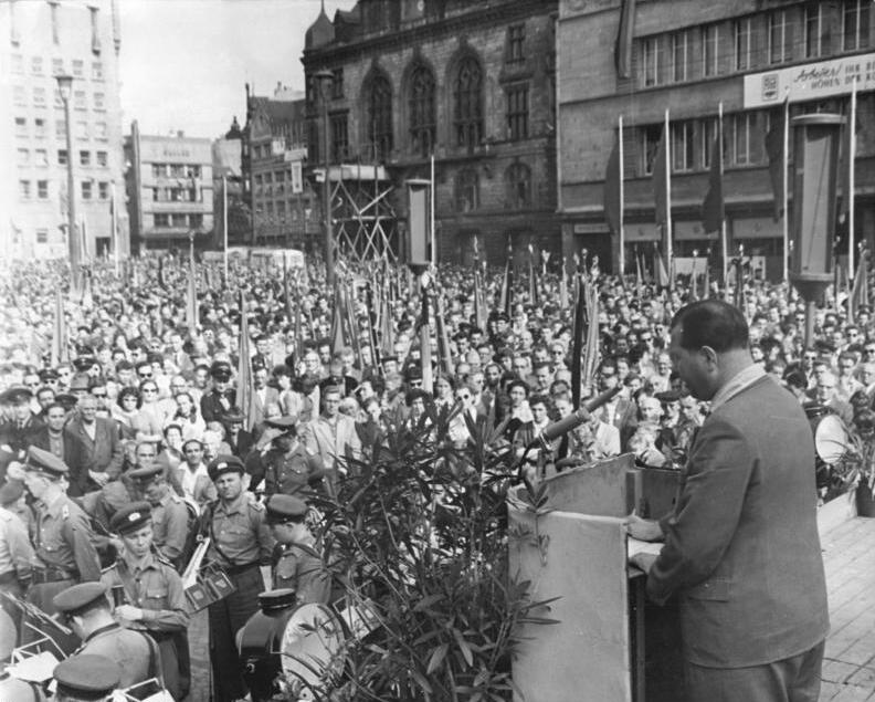 Halle/Saale, I. Arbeiterfestspiele, Großkundgebung Zentralbild Schmidt 20.6.1959 Großkundgebung in Halle. Unter der Losung "Der neue Verständigungsvorschlag der UdSSR und der DDR in Genf - eine grosse Chance für Deutschland" fanden sich am Nachmittag des 19.6.1959 weit mehr als 100.000 Werktätige von Halle zu einer Großkundgebung auf dem Obermarkt zusammen, an der auch zahlreiche westdeutsche Werktätige, die Gäste der ersten Arbeiterfestspiele sind, teilnehmen. (s. ADN-Meldung vom 19.6.1959) UBz: Der Vorsitzende des FDGB-Bezirksvorstandes, Helmut Kriegel, spricht zu der Hallenser Bevölkerung.